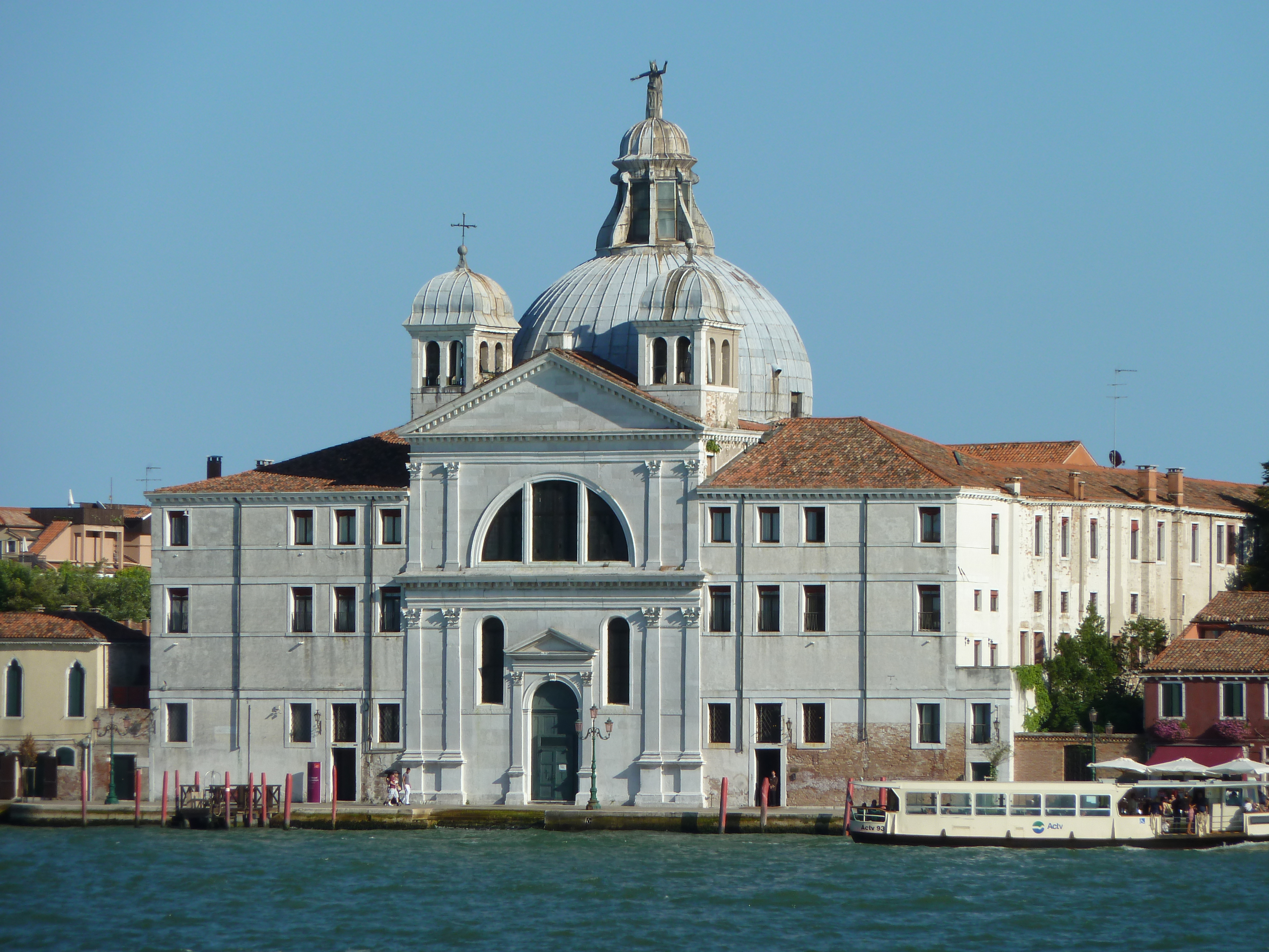 Zitelle